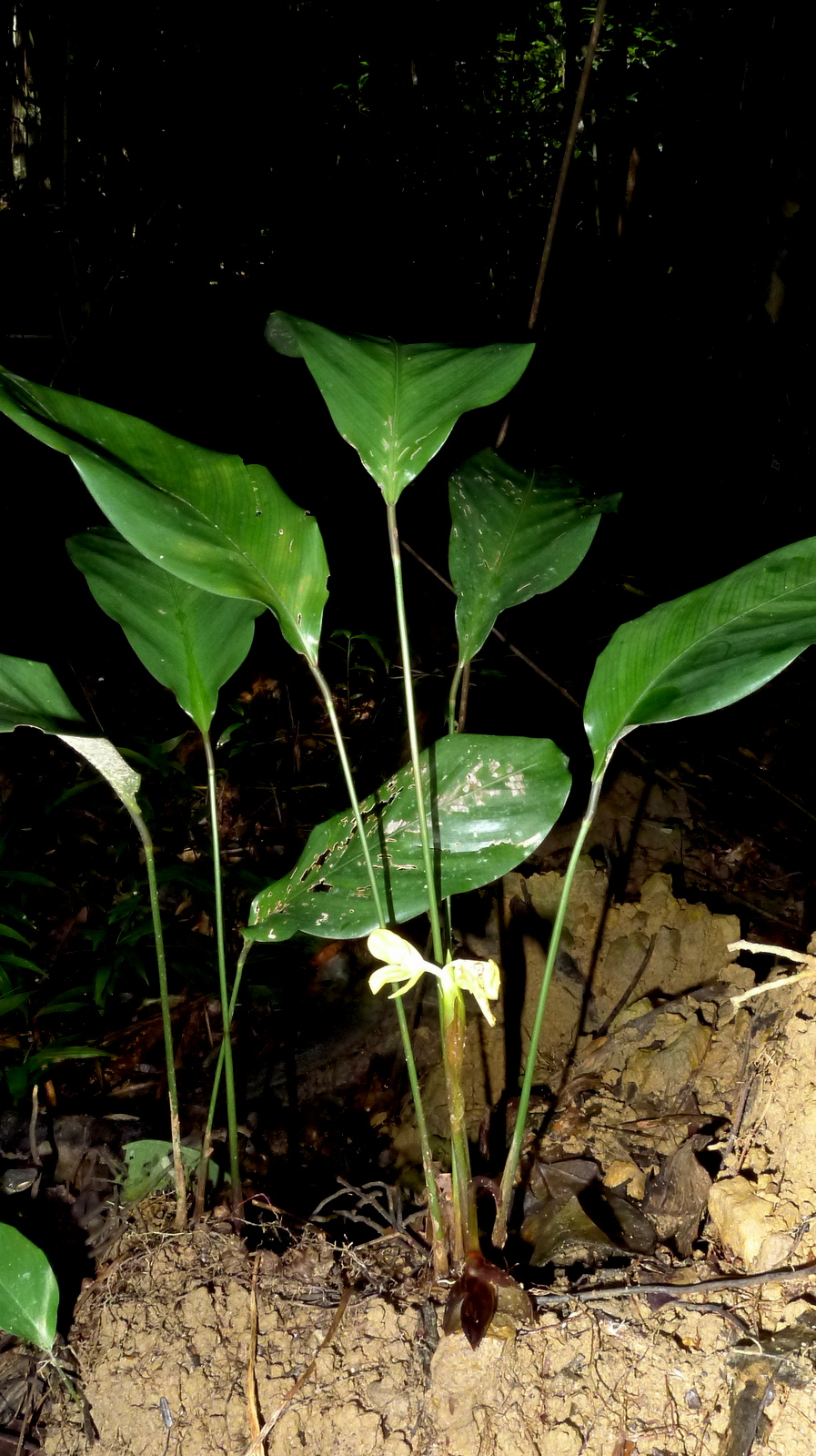 Goeppertia brasiliensis (Körn.) Borchs. & S. Suárez